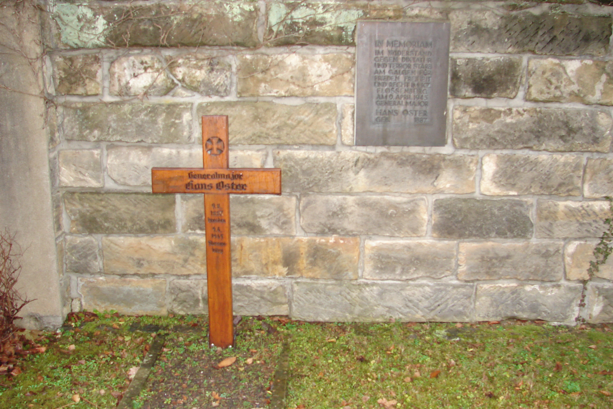 Grab des Widerstandskämpfers Generalmajor Hans Oster auf dem Nordfriedhof Dresden